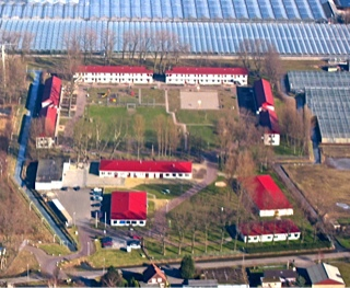 Luchtfoto van woon- en dienstgebouwen van het nieuwe AZC De Lier